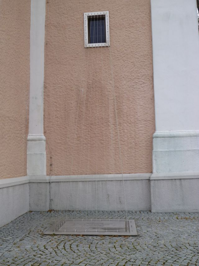 Denkmal der Künstlerin Bibiana Weber